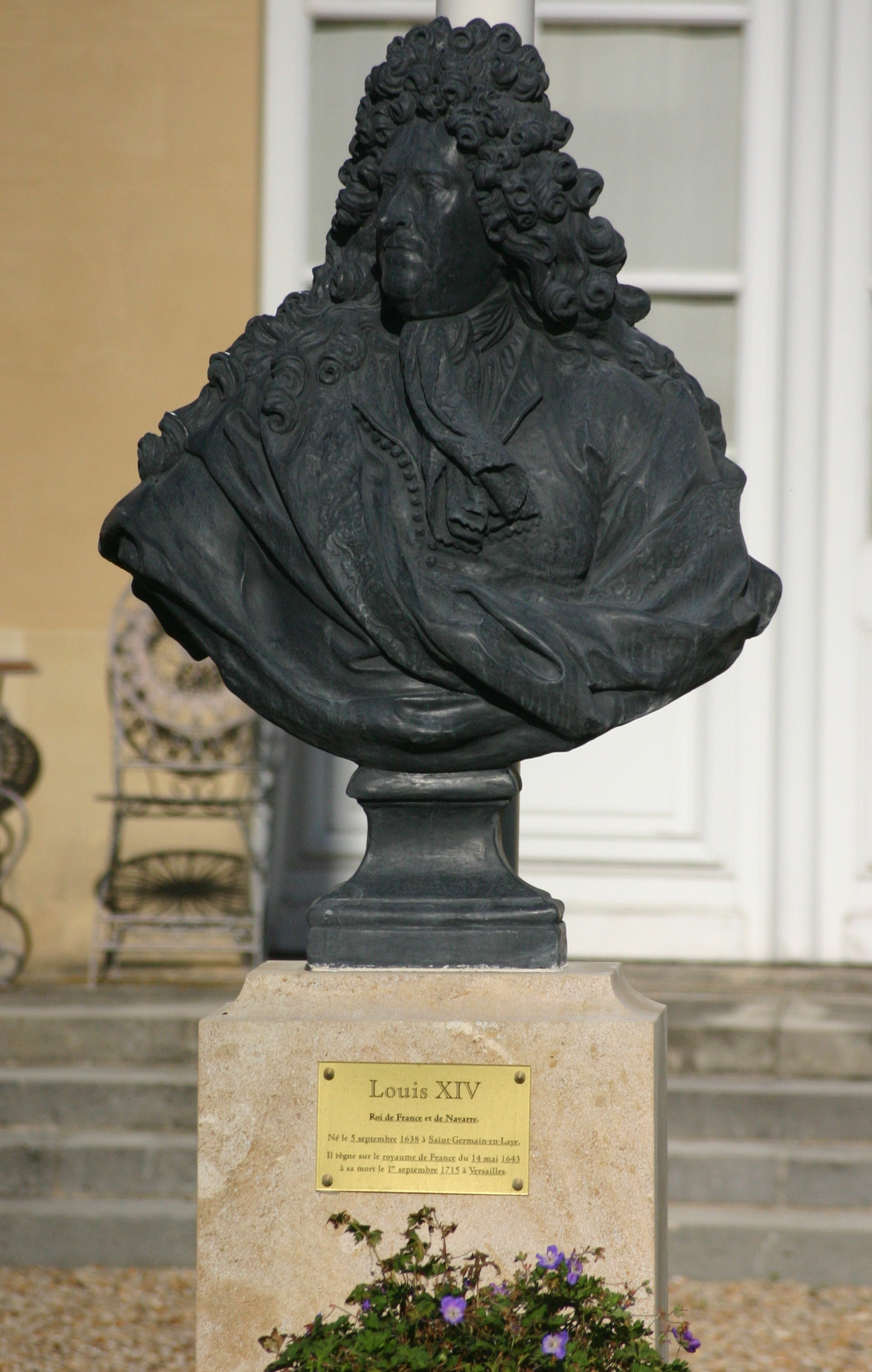 Buste de Louis XIV situé dans la cour du château du Val à Saint-Germain-en-Laye (Yvelines, France)